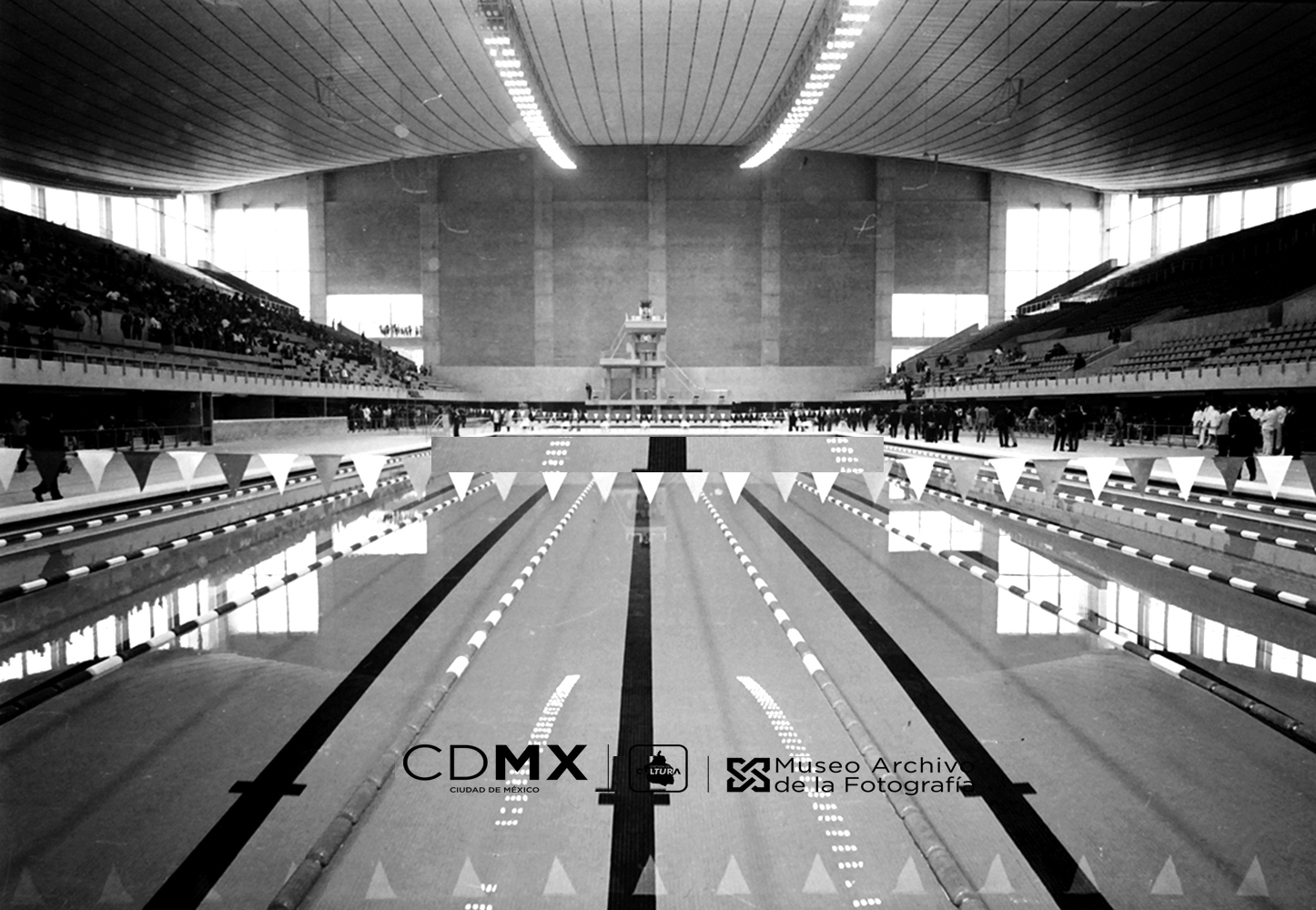 Fotografía antigua de la Ciudad de México resguardadas por el Museo Archivo de la Fotografía (MAF) de la Ciudad de México.